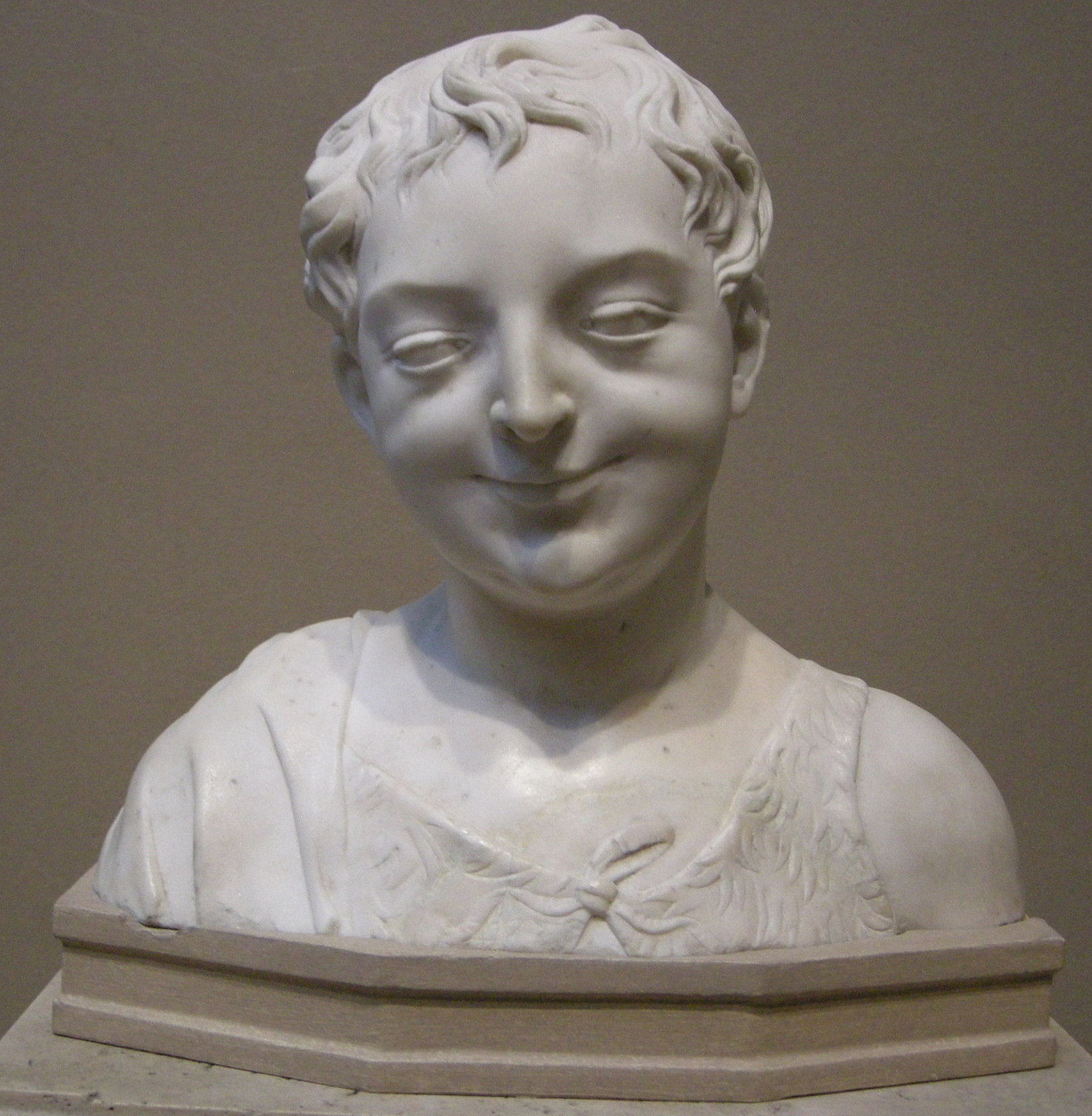 Giovanni di gregorio, giovanni battista fanciullo, 1470-1500